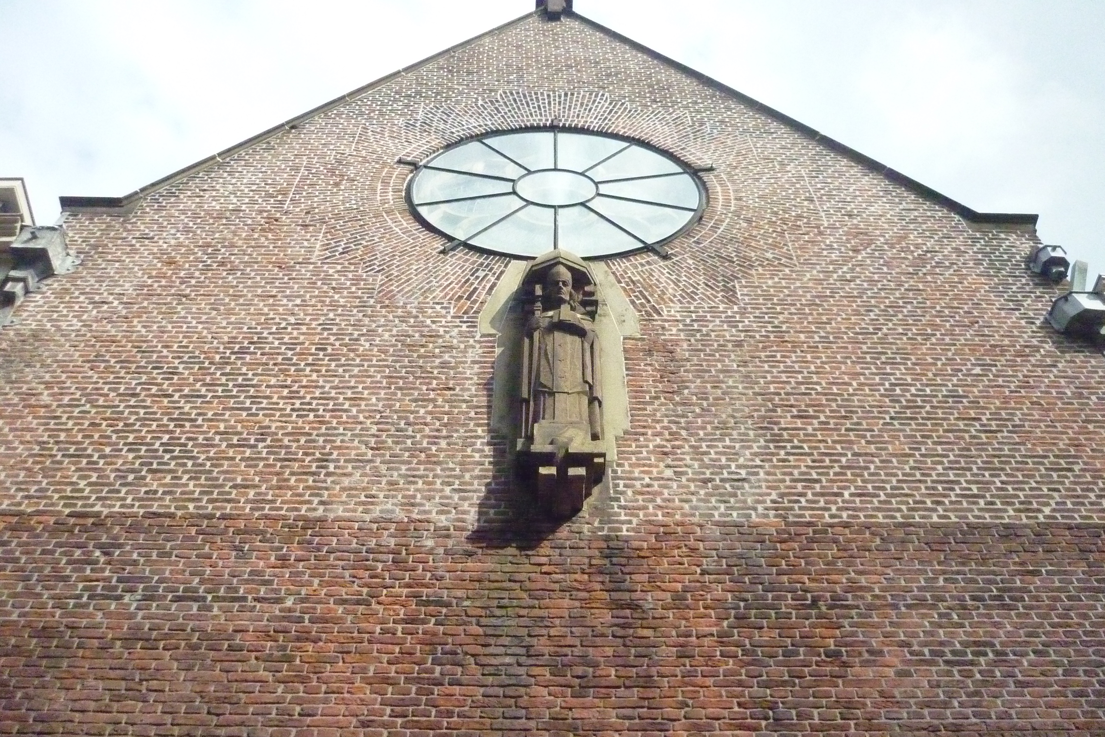 Beeld van Willibrord in de Oude Molstraat